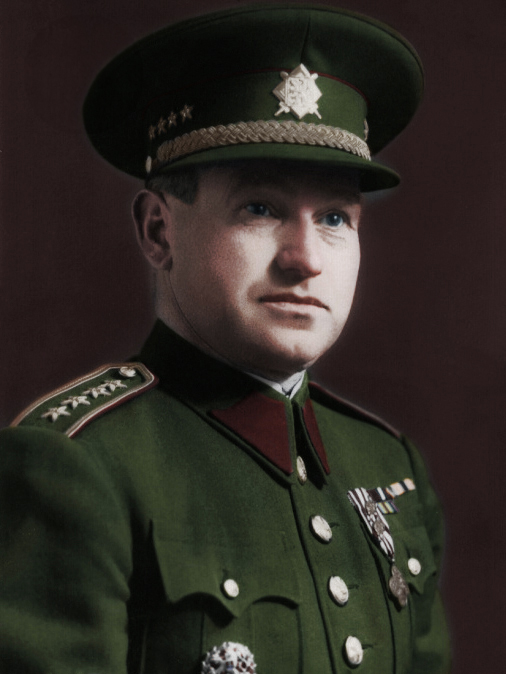 Alois Liška na fotografie jako půlukovník u dělostřeleckého pluku 51, který sídlil v Jičíně.